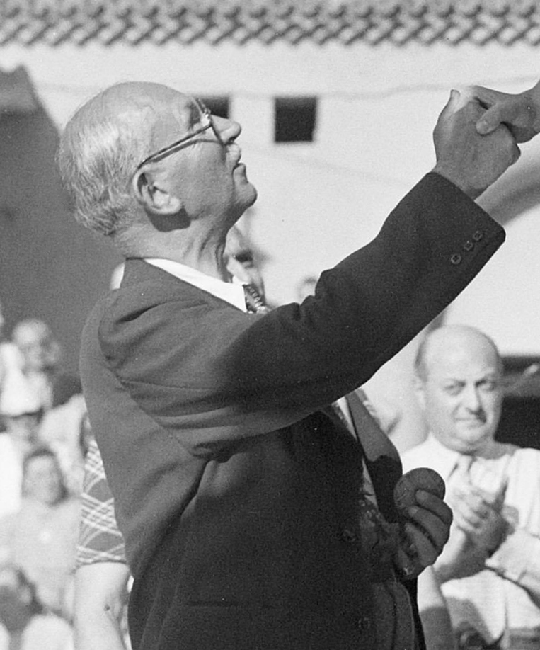 Europese zwemkampioenschappen te Monaco. Ceremonie Protocollaire. De heer Drigny feliciteert Nel van Vliet